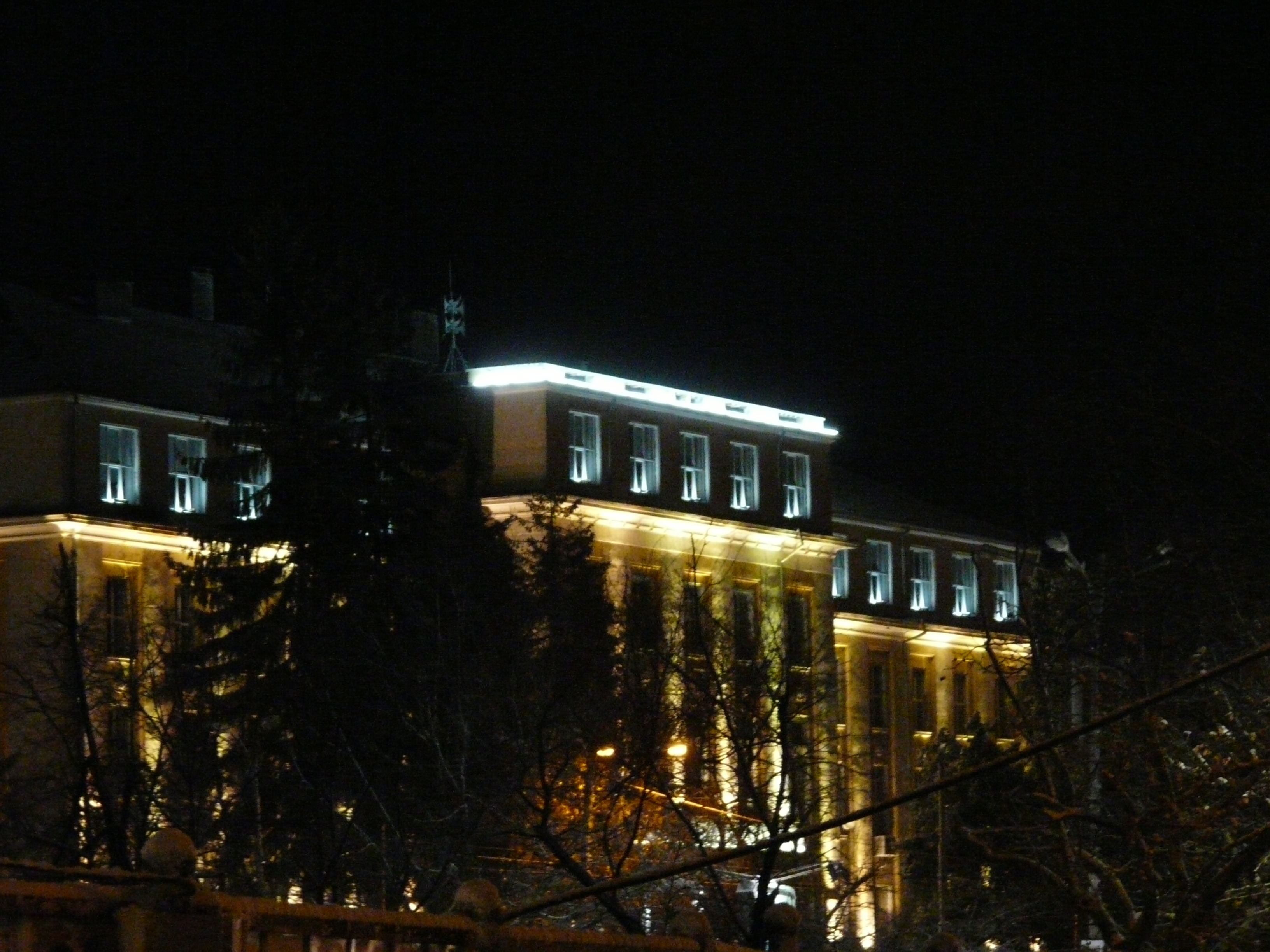 Софийска гимназия по строителство архитектура и геодезия „Христо Ботев“